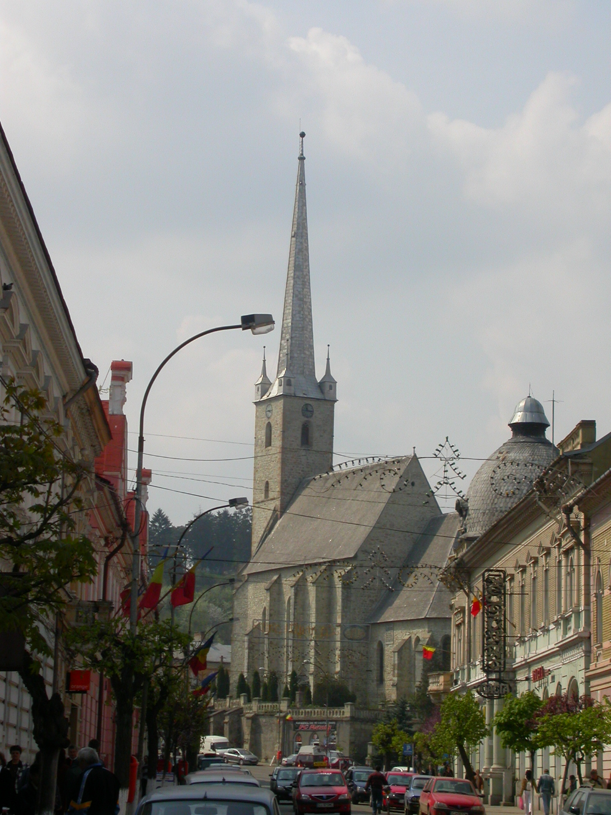 Ansamblul urban "Centrul istoric Dej"